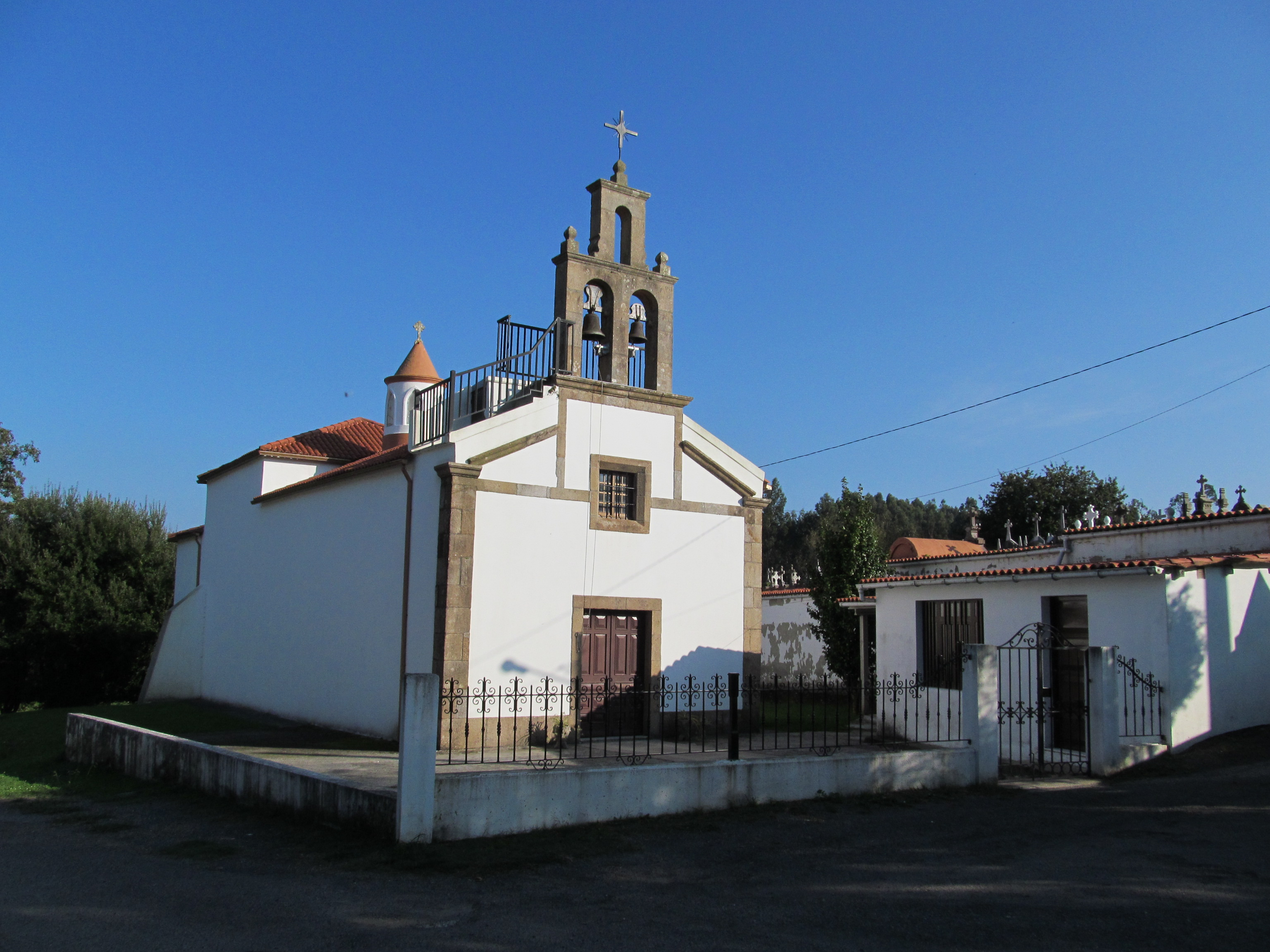 Iglesia parroquial de San Juan de Piñeiro, en Mugardos, Galicia, España.